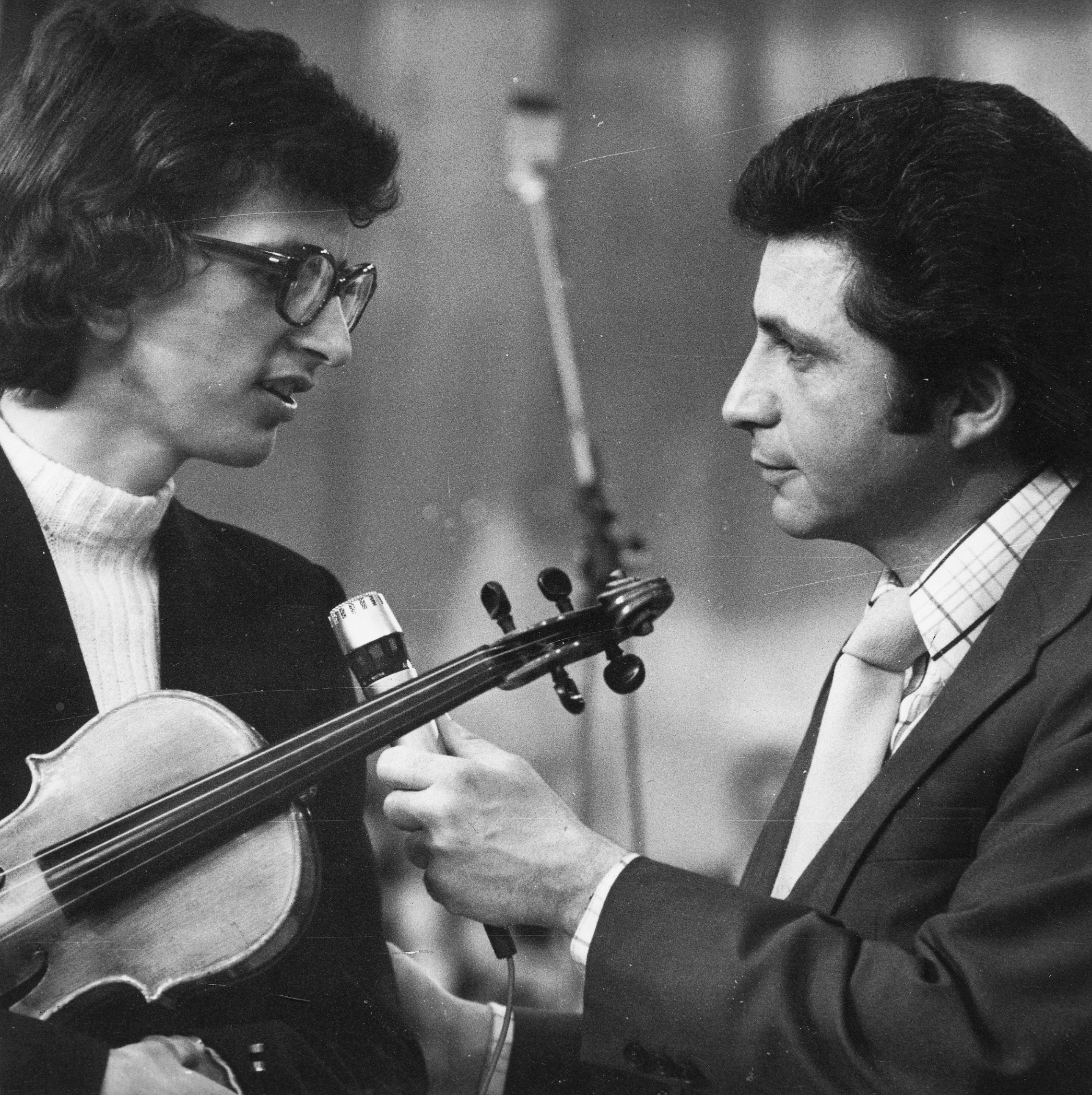 "Pataky" Művelődési ház, Ki mit tud? Első elődöntő, Horvát János műsorvezető beszélget a veszprémi Lovassy Gimnázium Kamarazenekarának egyik tagjával. Location: Hungary, Budapest X. Tags: Budapest, reporter, microphone, violin Title: \